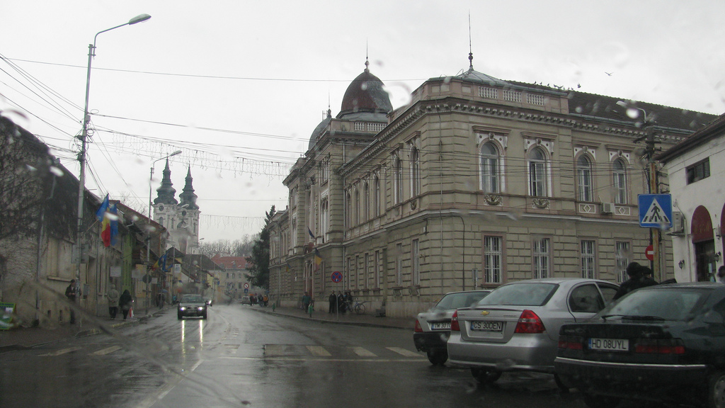 municipal court in Lugoj, Romania